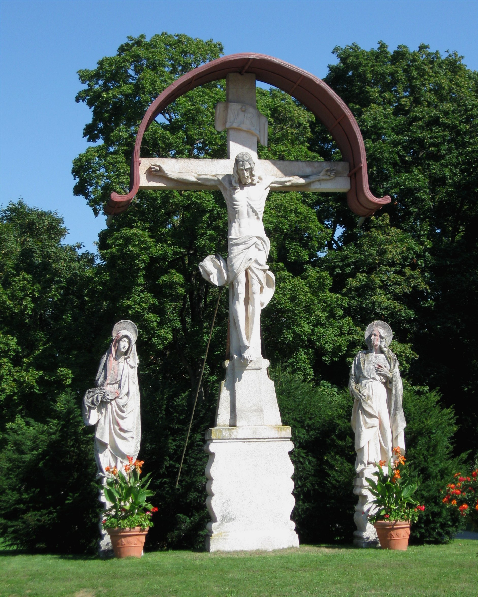 Baldurstraße 28; Westfriedhof, angelegt von Hans Grässel 1897 ff., mehrfach erweitert. Friedhofsgebäude im frühchristlichen Stil, 1897–1902 von Grässel: östlich Verwaltungsgebäude, in der Mitte Versammlungshalle (Kuppelbau mit wohlerhaltener Innenraumgestaltung), westlich Leichenhaus in Form einer Basilika mit Turm und Annexen; die drei Teile durch Arkadengänge verbunden. Nördlich Terrasse, mit steinerner Ölberggruppe unter Baldachin; am Abgang zum zentralen, von Vasenpfeilern umgebenen Gartenparterre östlich hoher Pfeiler mit Feuerschale; im Parterrezentrum steinerne Kreuzgruppe. Westlich an der großen Ostwestallee großer Brunnen, bez. 1911; unweit westlich Platz mit zwei gleichartigen Brunnen von 1901 bzw. 1911. Am Ostende von Gräberfeld 101 Gehäuse mit großer geschnitzter Kreuzgruppe. Gartenkünstlerisch bedeutende Anlage mit zahlreichen Grabdenkmälern seit der Jahrhundertwende.